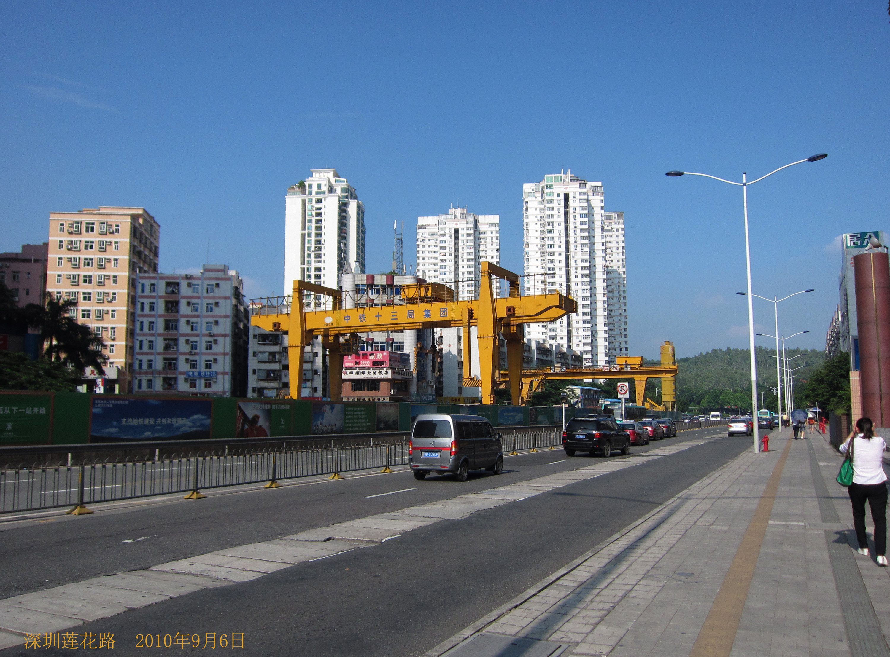 地铁2号线 Metro Line 2, under construction